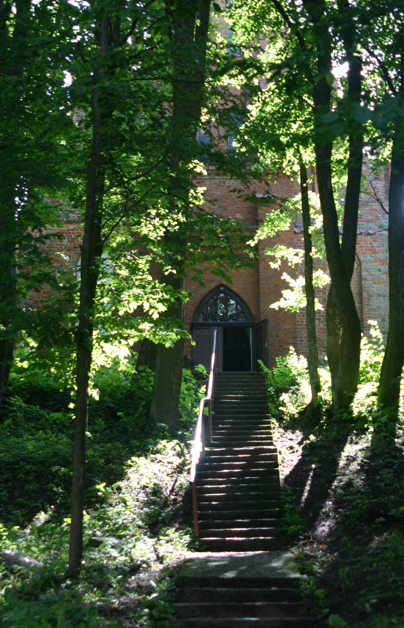 Czerniki - kościół parafialny, obecnie rzymskokatolicki filialny p.w. św. Jana Ewangelisty, kon. XIV, XVIII